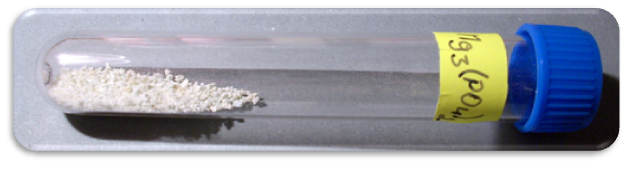 Fosforečnan hořečnatý - Mg3(PO4)2